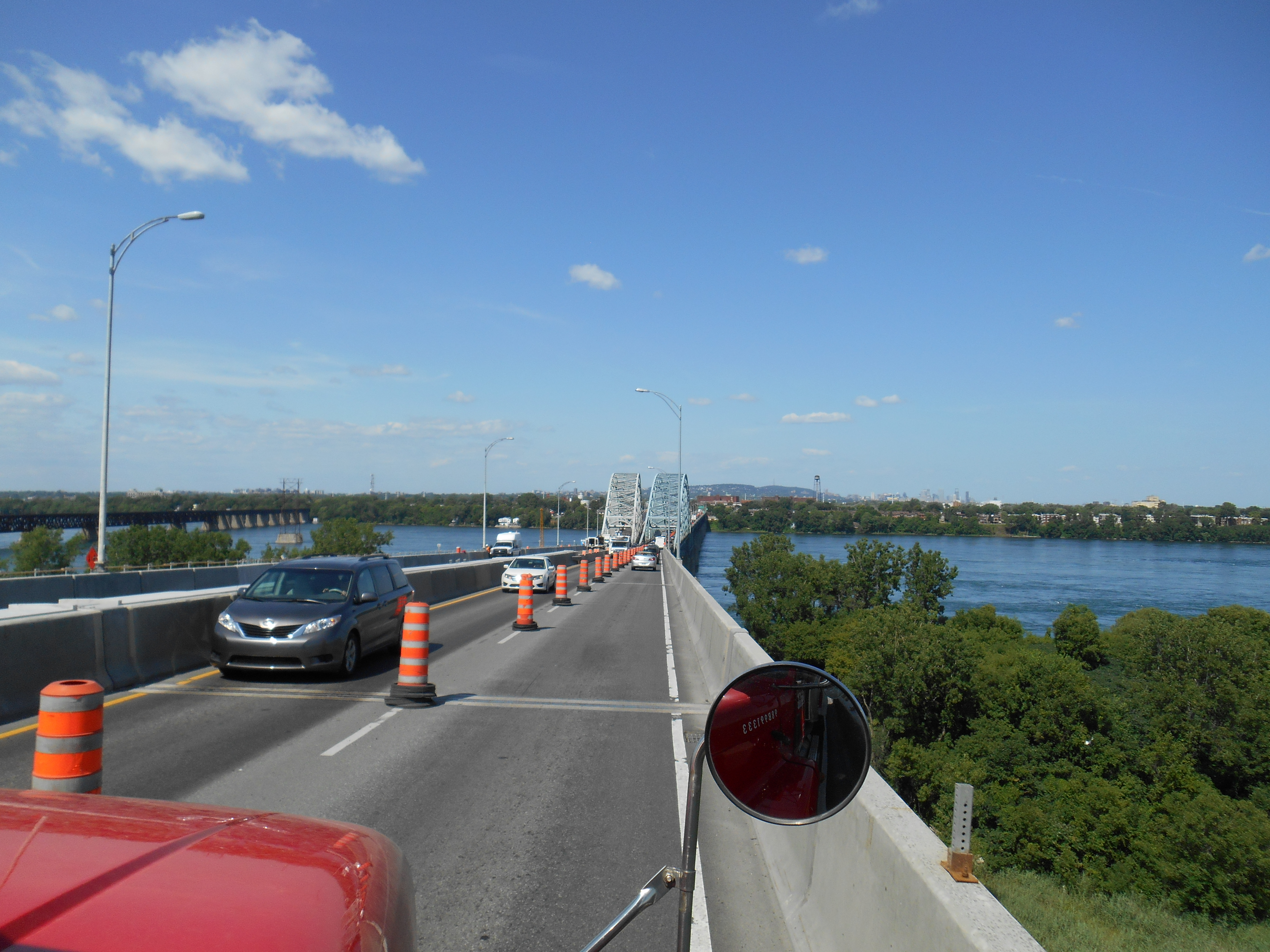 Pont Honoré-Mercier, vers Montréal